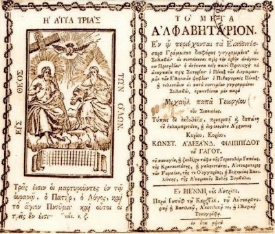 Το-πρώτο-ελληνικό-αλφαβητάριο-¨Μέγαν-Αλφαβητάριον¨-Μιχαήλ-Παπαγεωργίου.